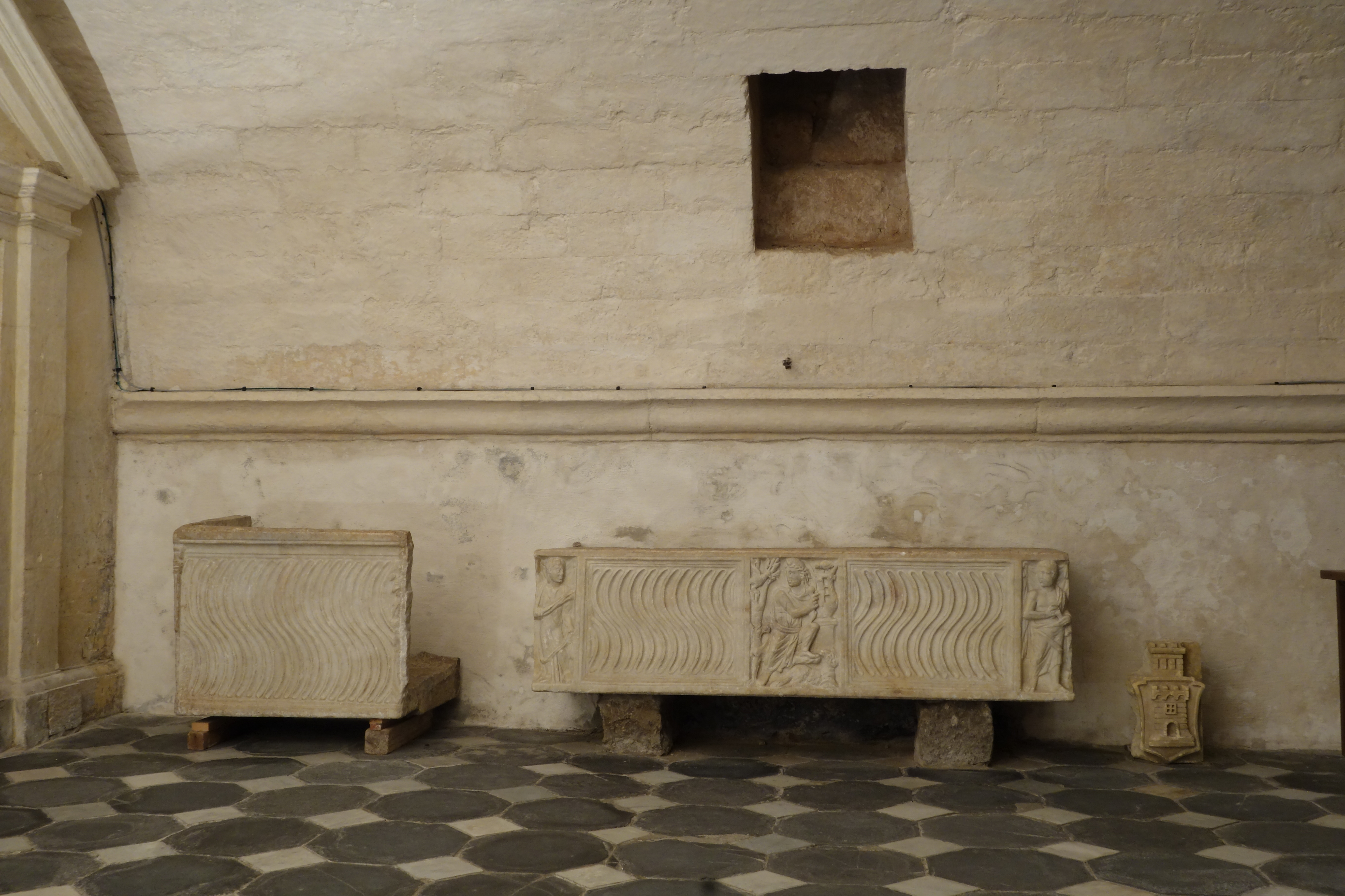 Basilica di San Gavino